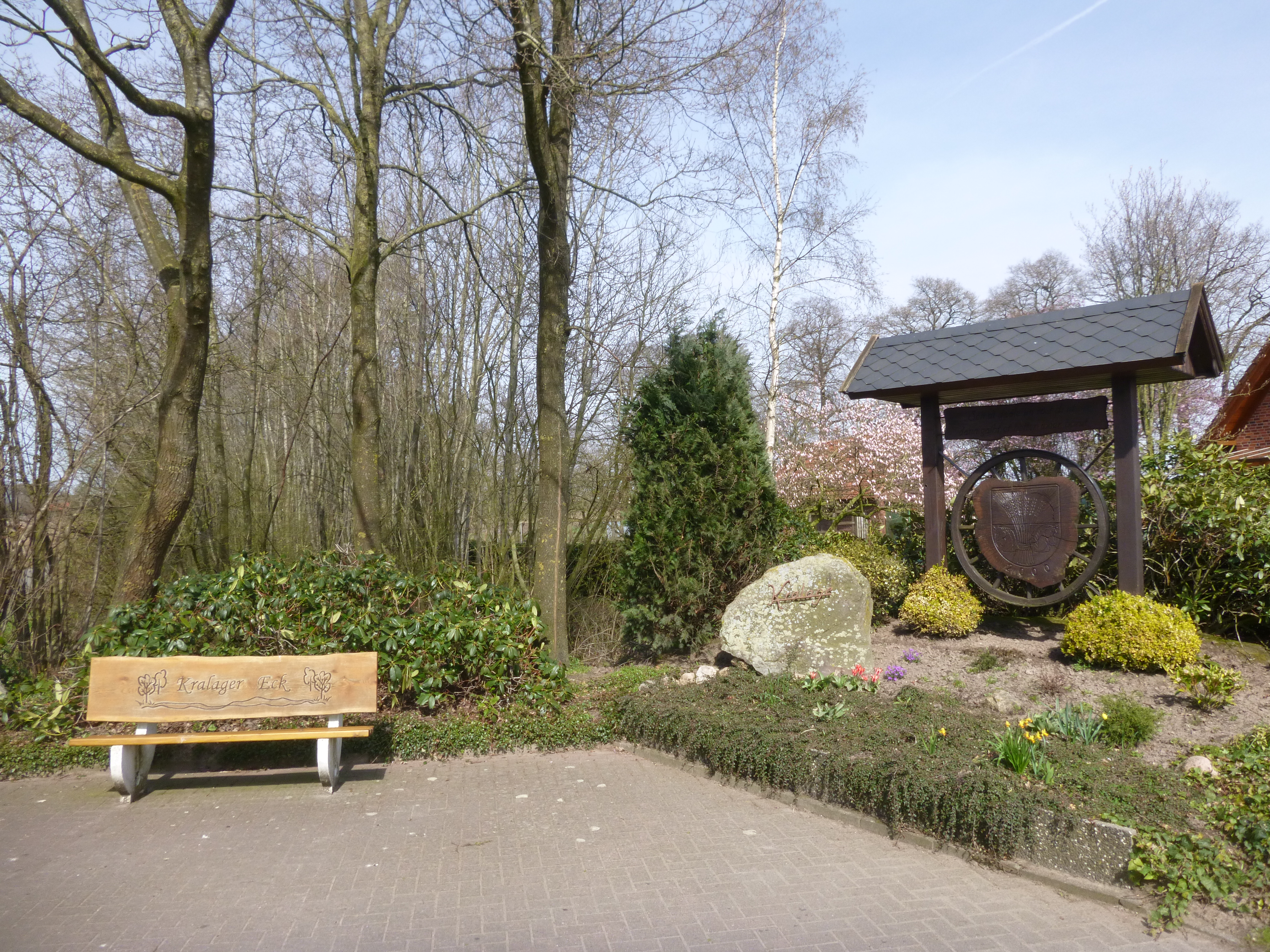 paŭzejo Kralage en Andervenne, Malsupra Saksio, Germanio